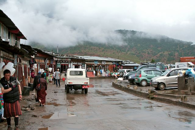 Old town of Wangdue Phadrong